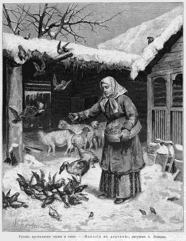 А. Земцов. Идилия в деревне. "Всемирная иллюстрация", №10, 1885.